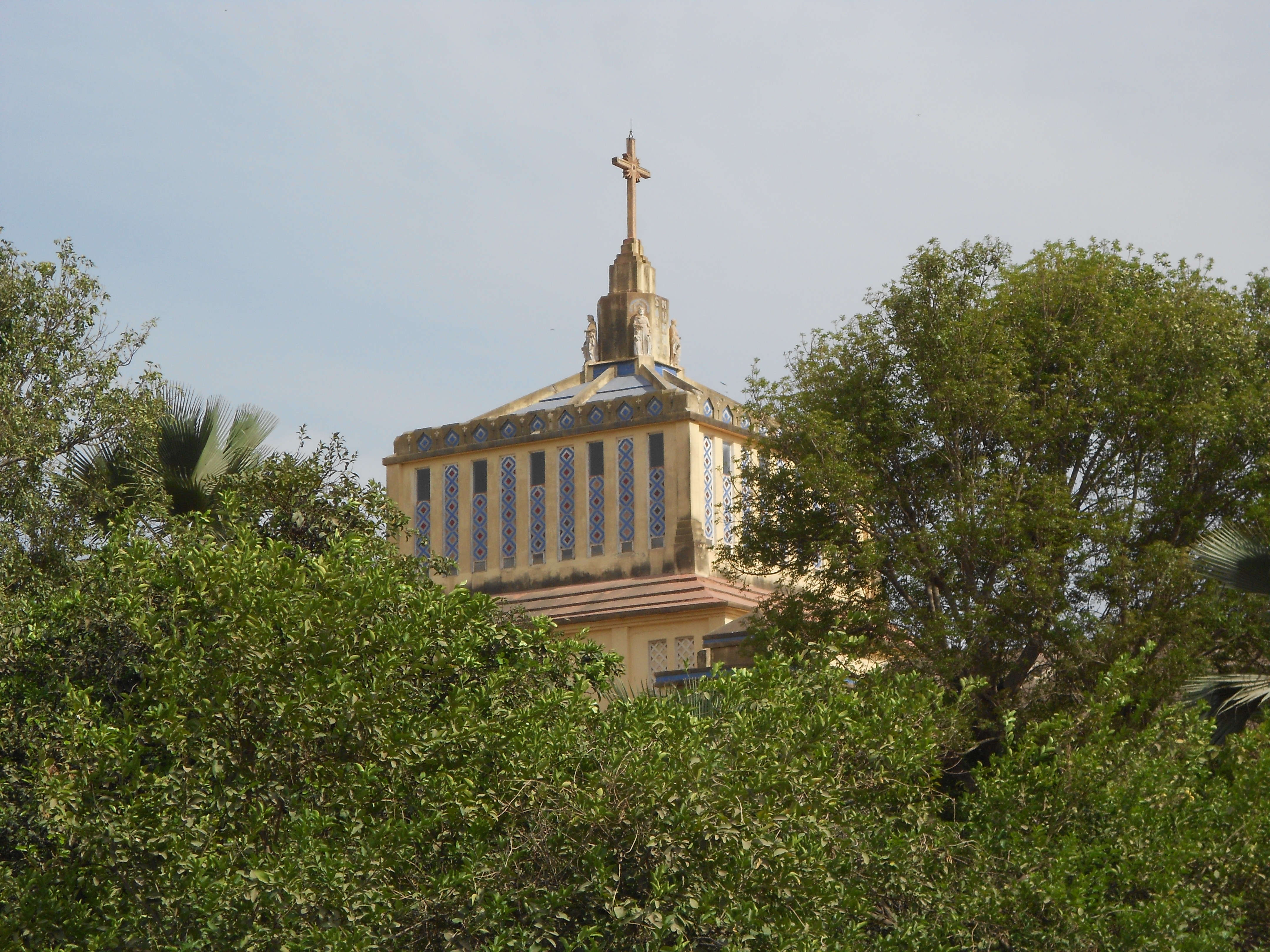 Cathédrale Sainte Anne in Thiès (Senegal)